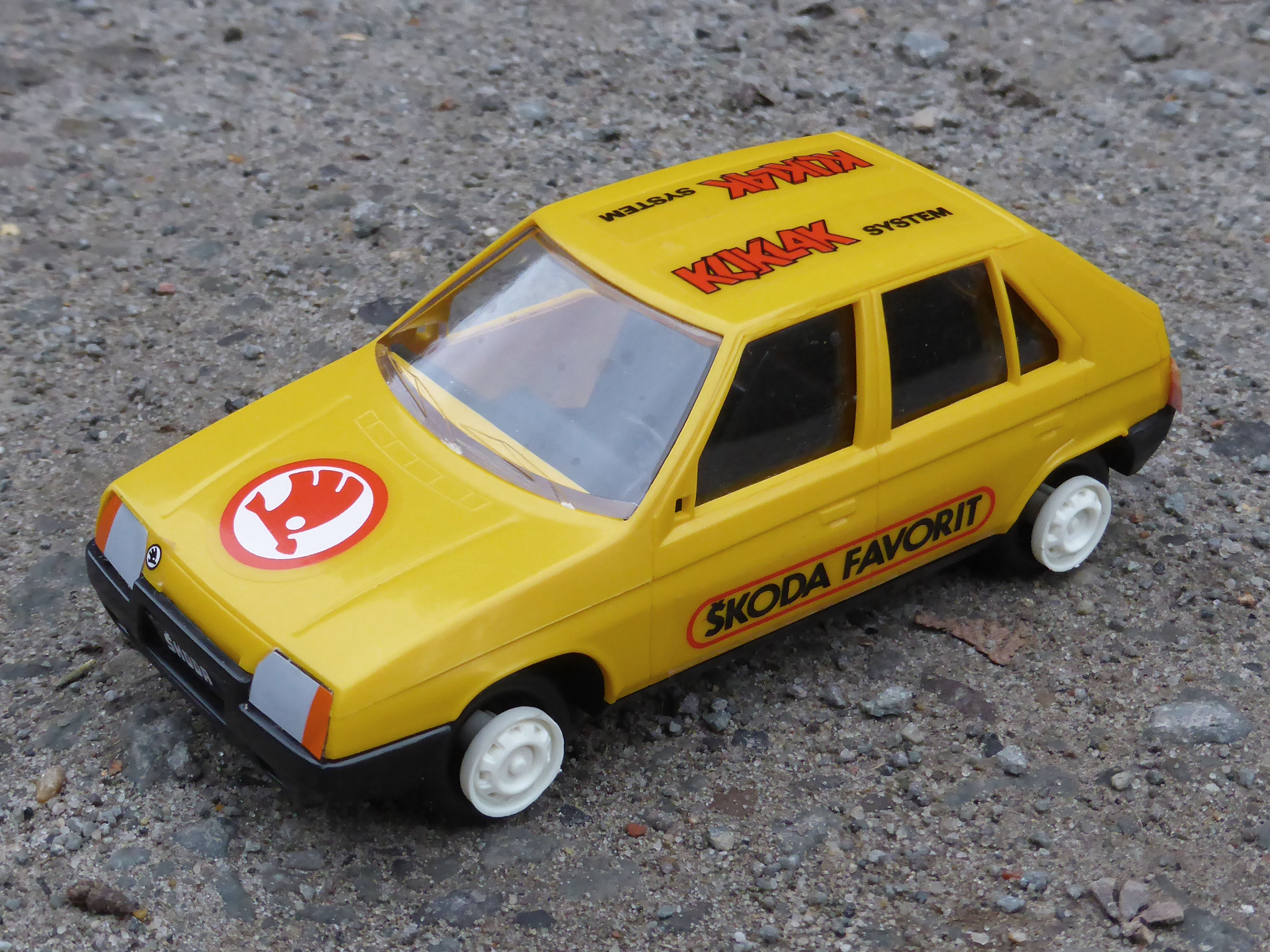 Modellauto "Skoda Favorit 136 L" von "SMĚR".